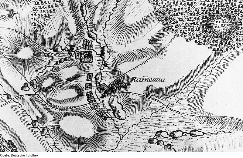 Original image description from the Deutsche Fotothek Rammenau. Karte von einem Teil des Kurfürstentums Sachsen, Petri, nach 1759 (Sign.: VII 63)